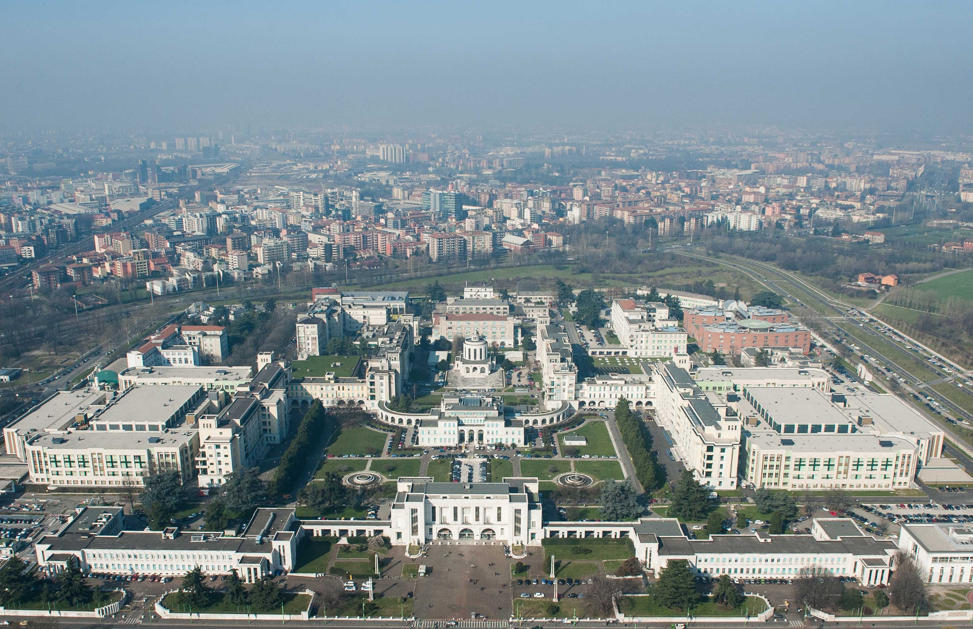 ospedale Niguard Ca' Granda, veduta aerea